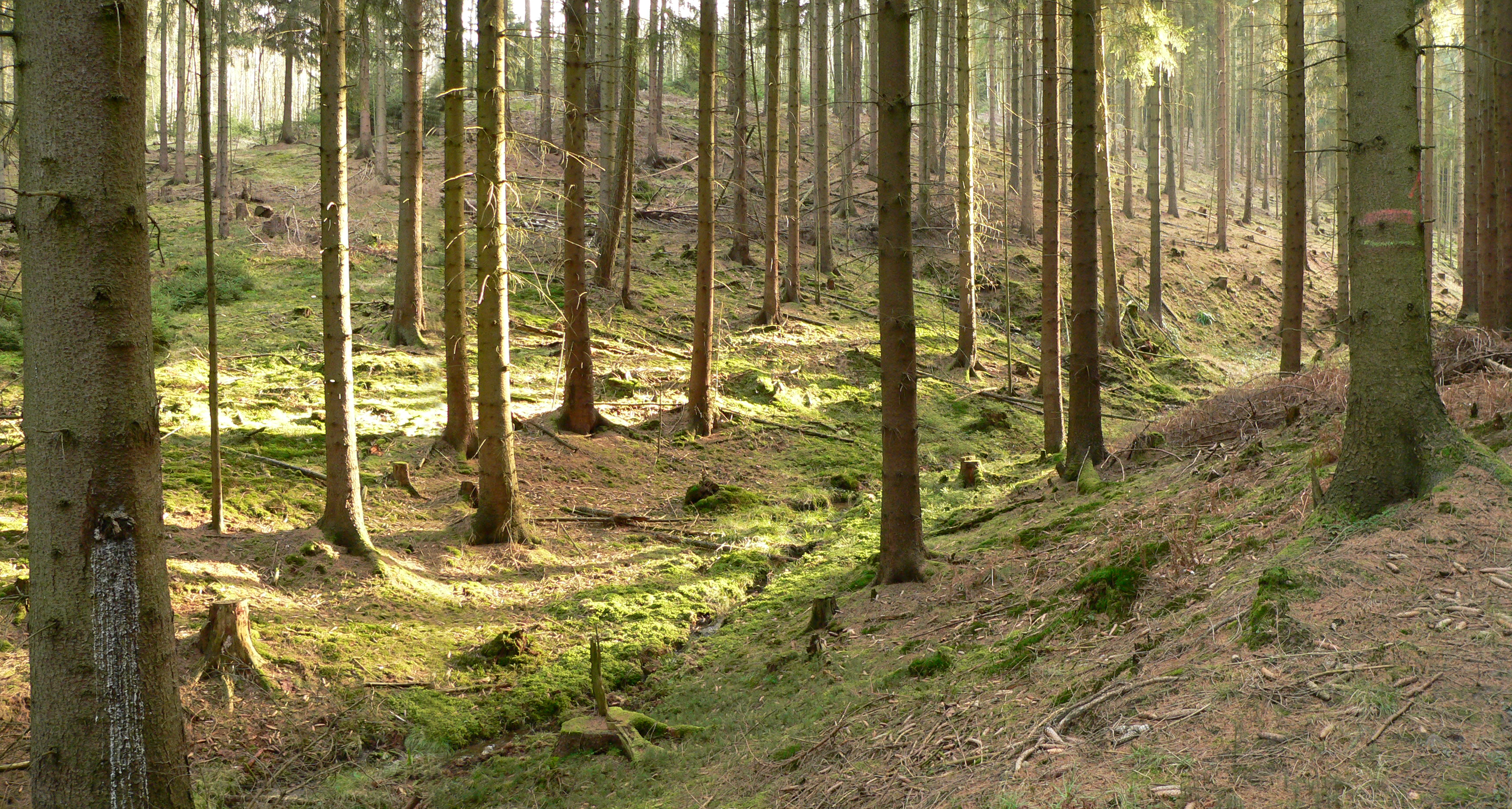 Fichtenforst in einem Bachtal im Schecken, in Niedersachsen, Norddeutschland